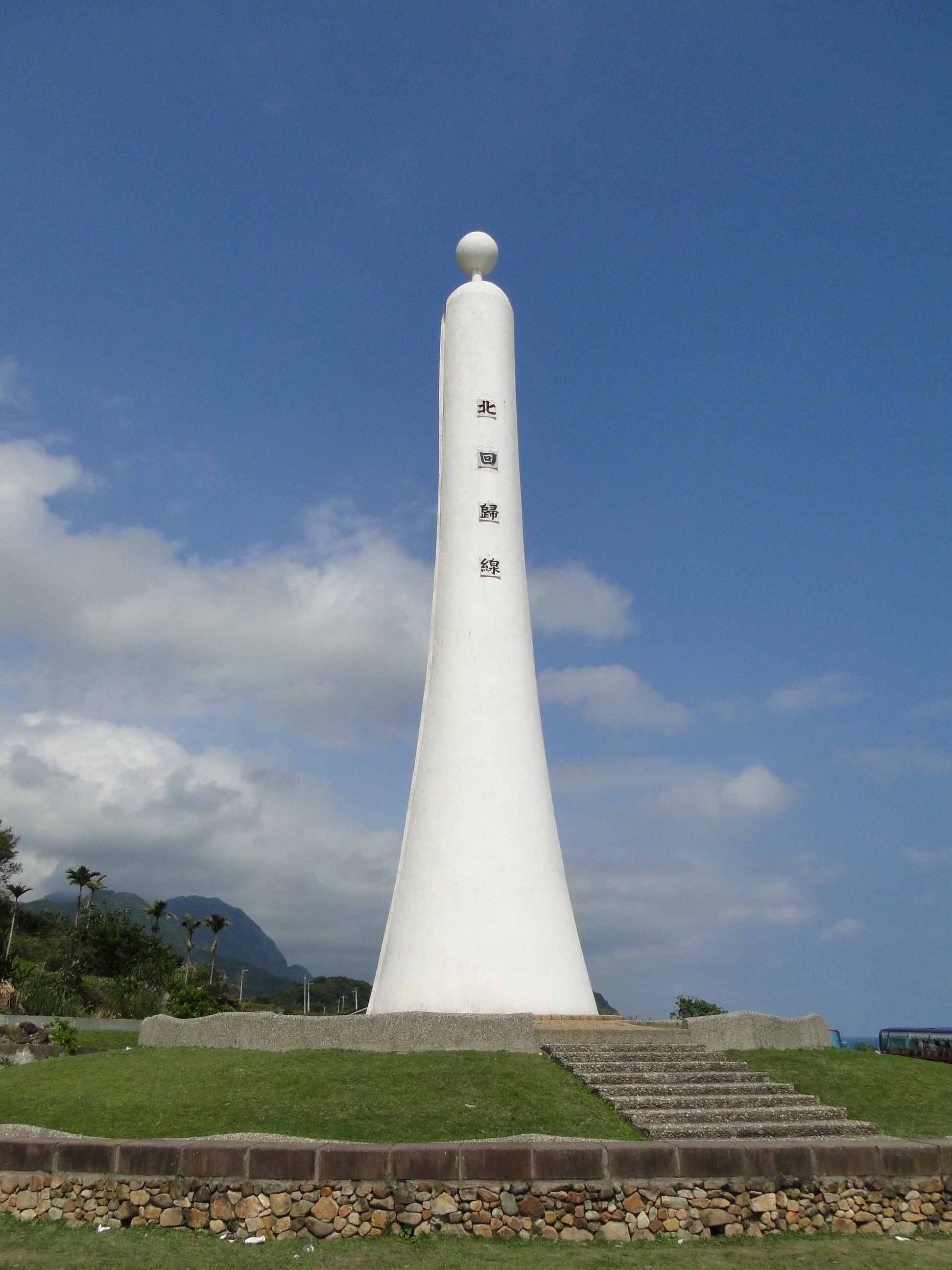 中文（台灣）: 花蓮縣豐濱鄉北回歸線標誌碑。